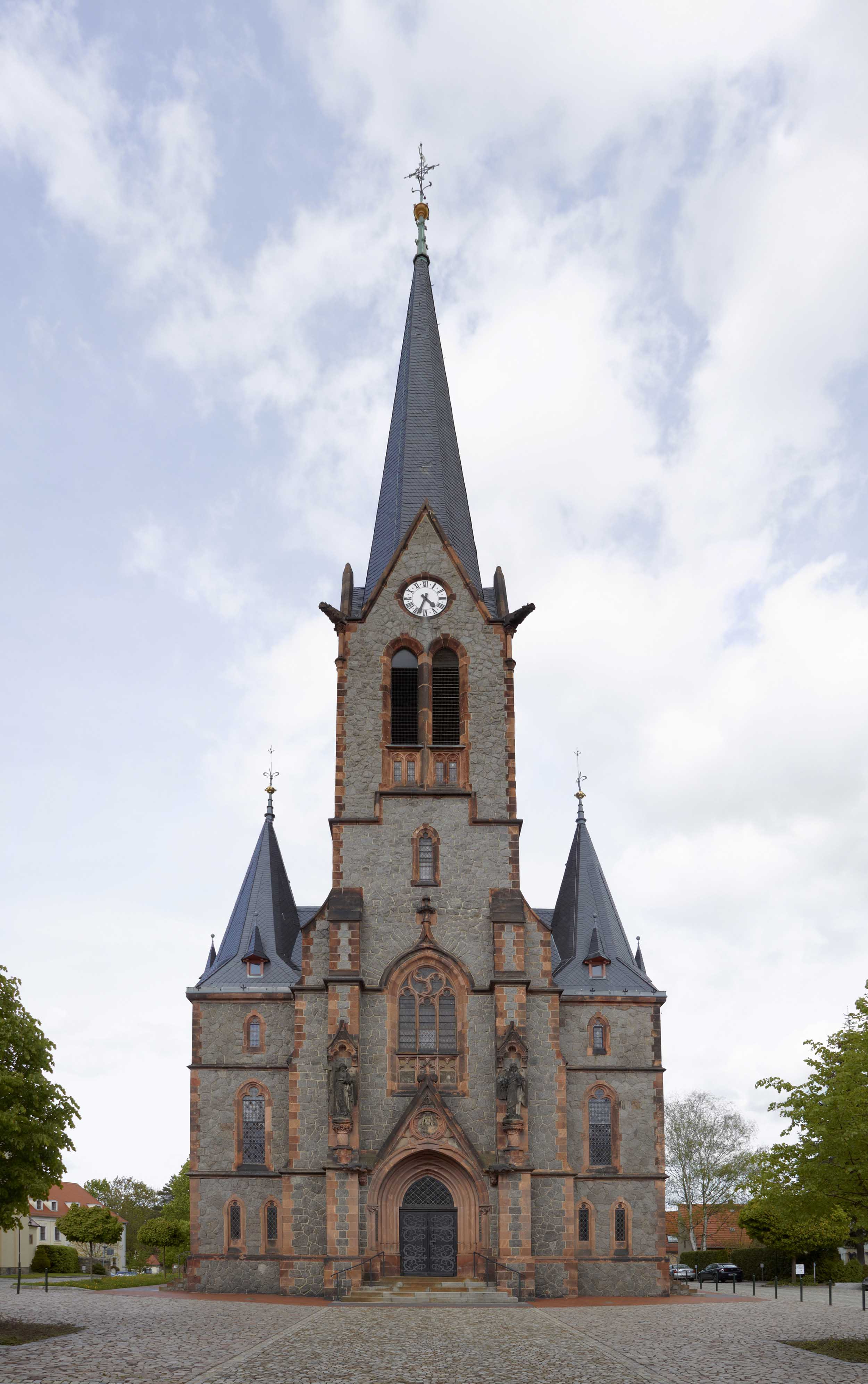 Nicolaikirche zu Wilsdruff; Westseite zur Meißner Straße der evangelischen Kirche.